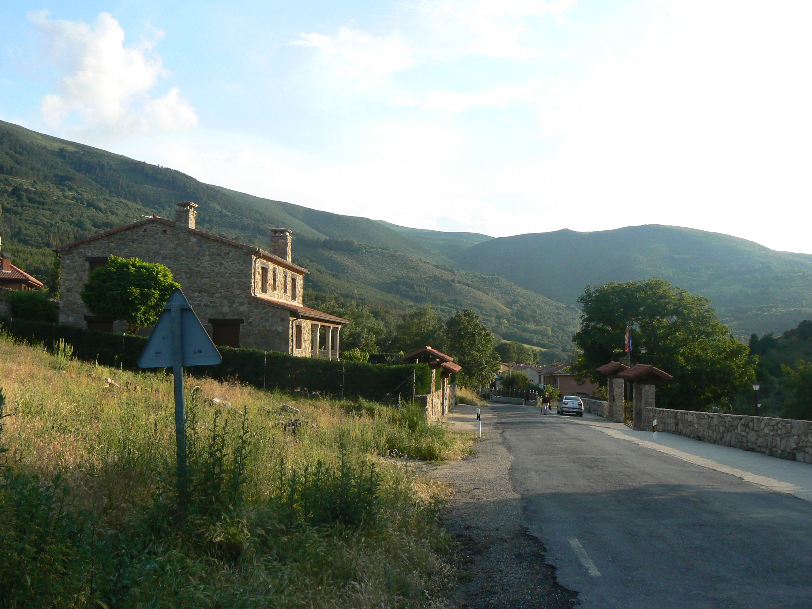 Sierra de Villafranca vista desde Navacepedilla de Corneja (provincia de Ávila, España.)